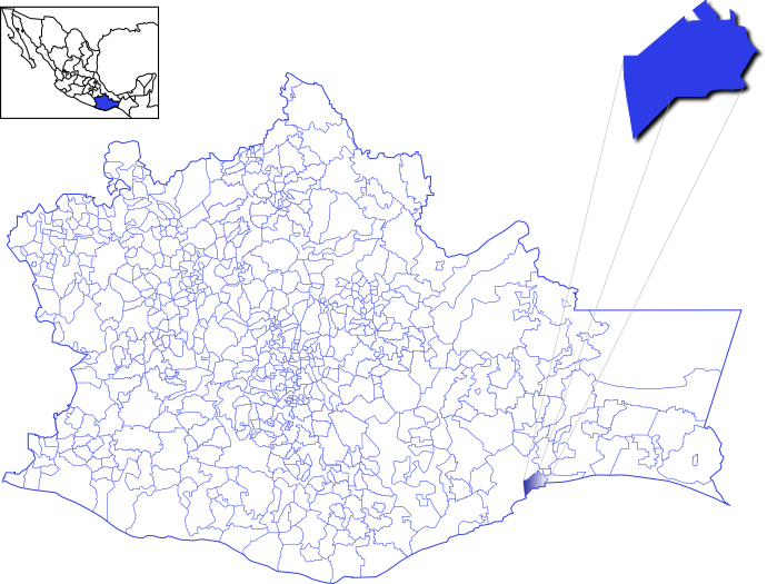 Mapa del municipio de Salina Cruz, Oaxaca, Mèxico.